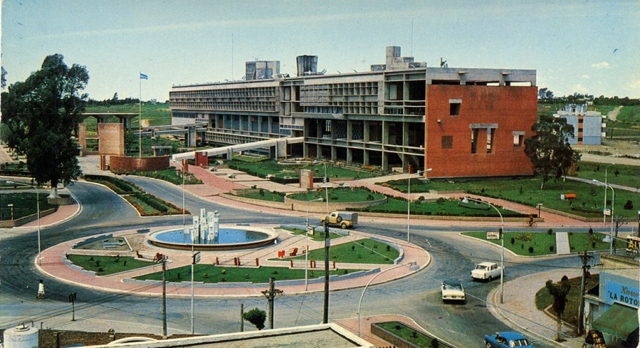 Postal que muestra la primera etapa del Centro Cívico de Santa Rosa, Provincia de La Pampa (Argentina). Obra de Clorindo Testa, asociados con Dabinovic-Gaido-Rossi, se construyó entre 1958 y 1963. En la imagen, rotonda de acceso y casa de gobierno. Al fondo, terminal de ómnibus.